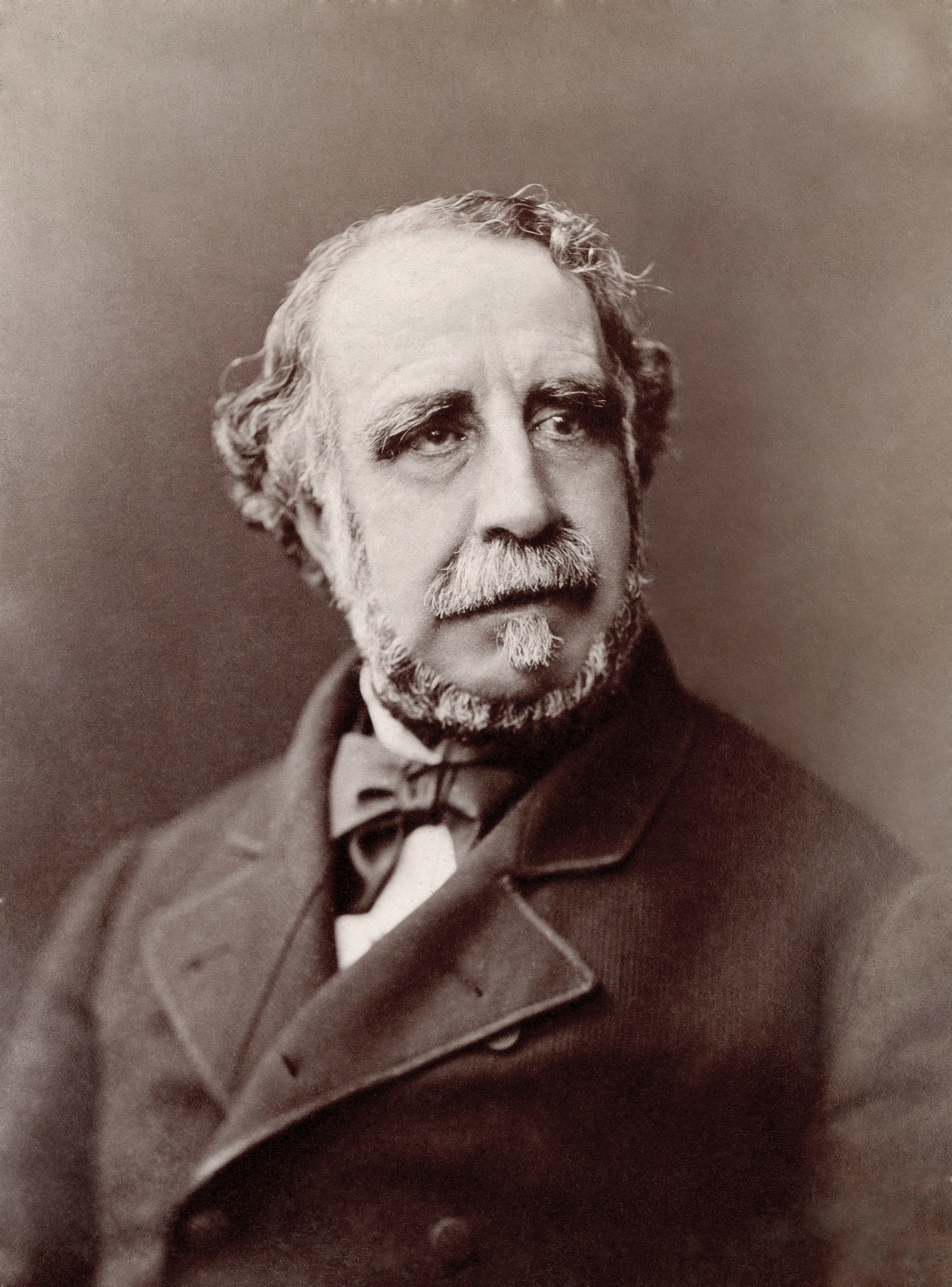 Mariano de las Mercedes Roca de Togores y Carrasco (1812 - 1889), primer marqués de Molins y primer vizconde de Rocamora, orador, escritor y político conservador español.